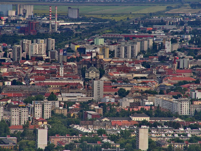 Centrum Kosice.jpg